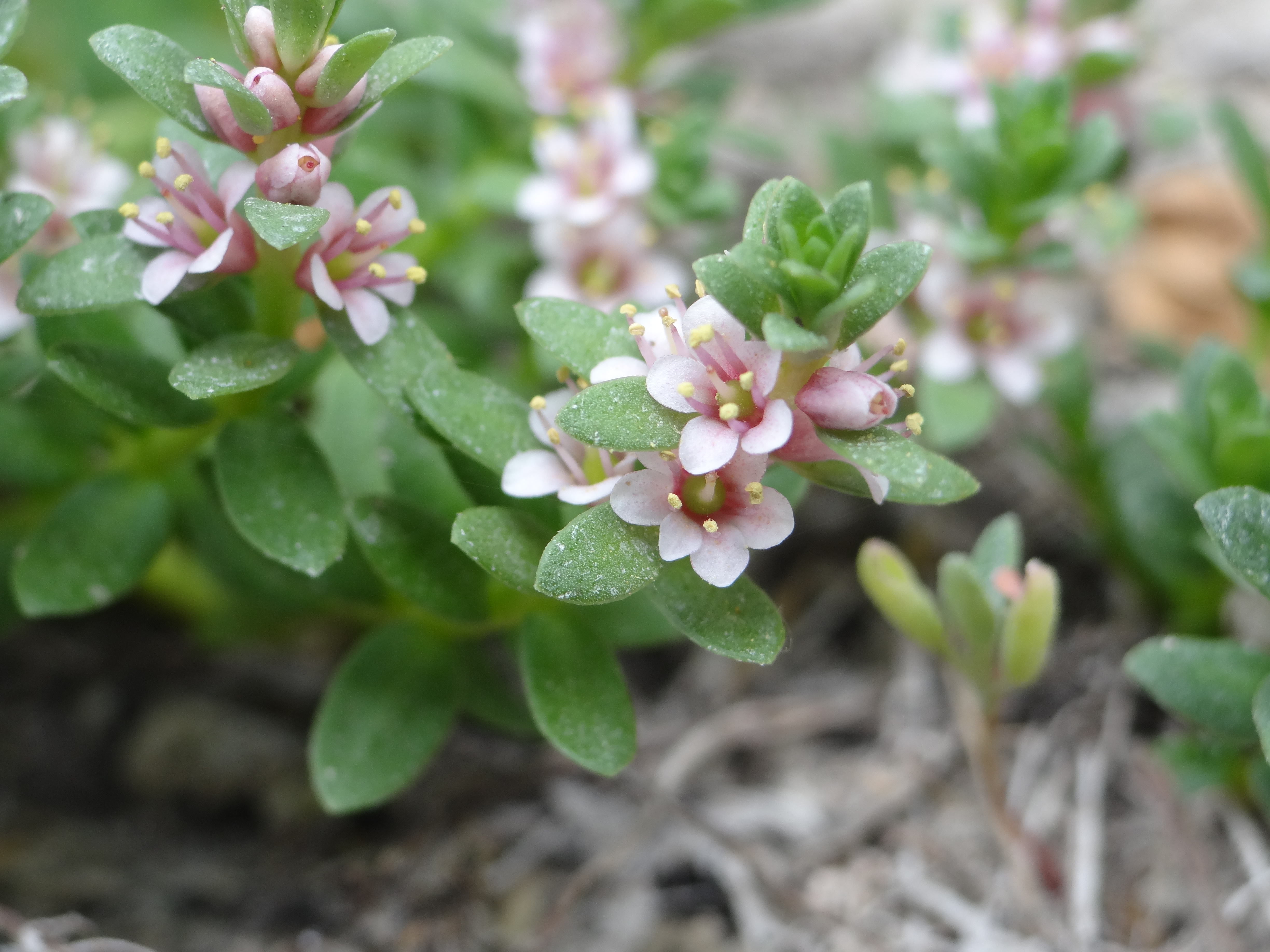 Glaux maritima - Baie de Somme - Le Crotoy.